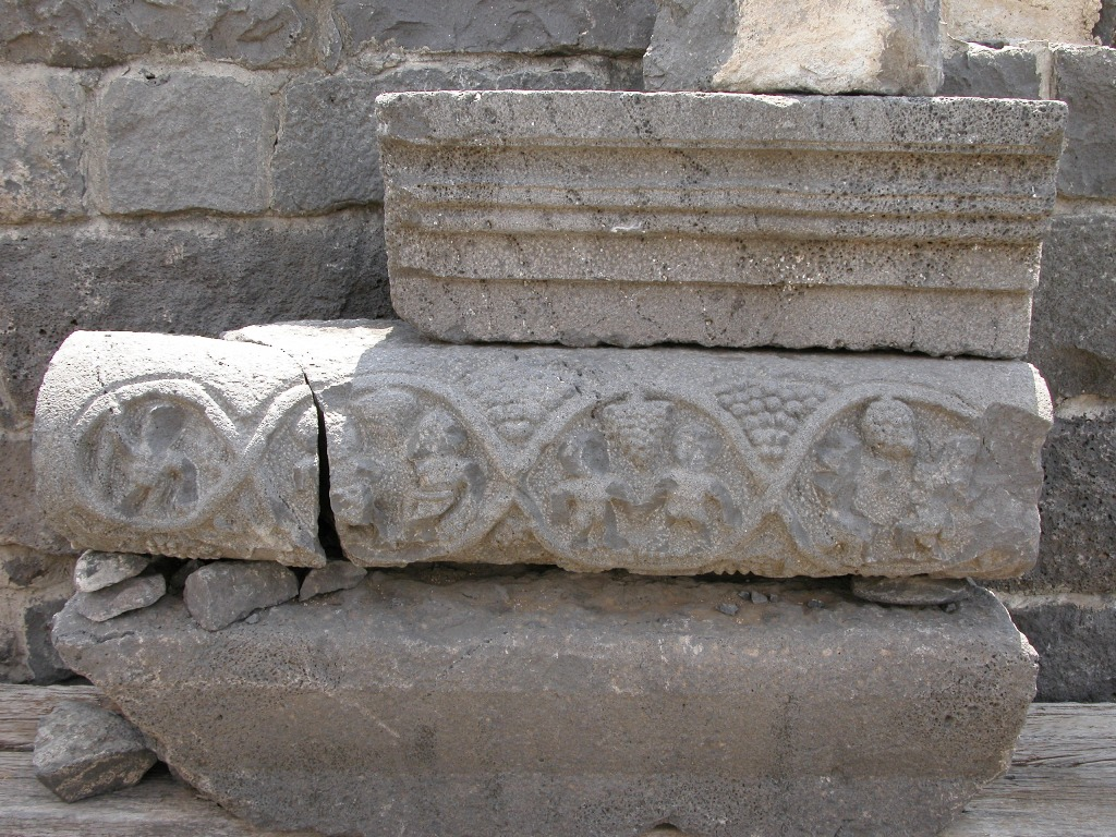 Old Synagogue in Korazim Israel.